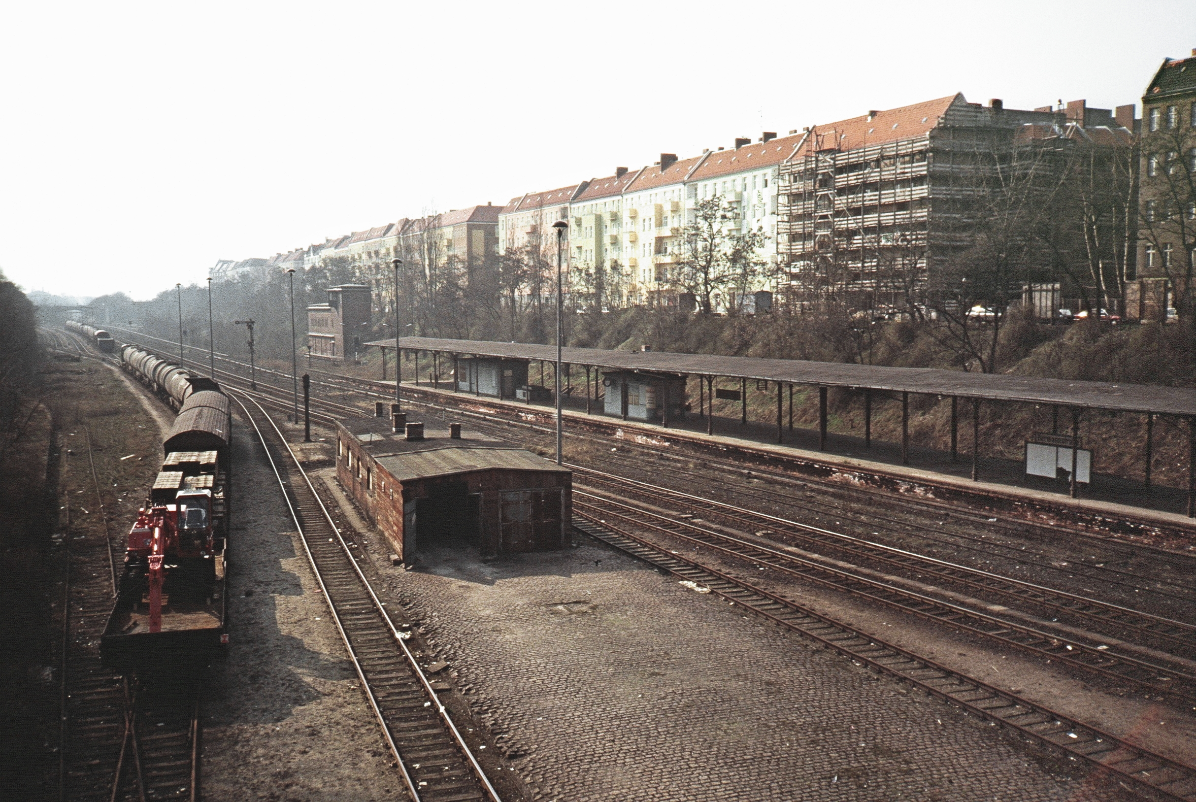 Bahnhof Berlin Hermannstraße